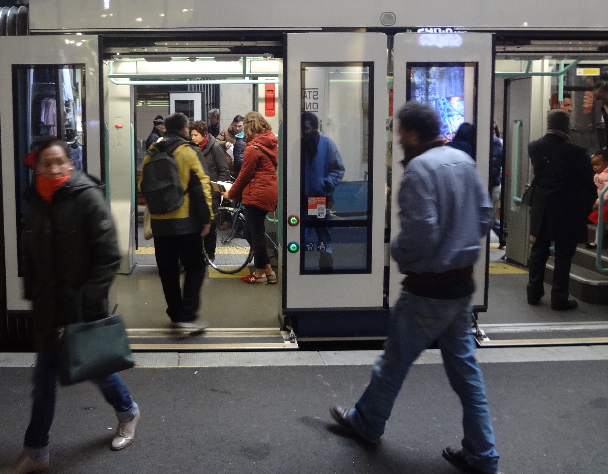 Depuis le 10 décembre 2017, les portes des trams des lignes 14 et 18 peuvent s'ouvrir de par et d'autres à l'arrêt Gare Cornavin.